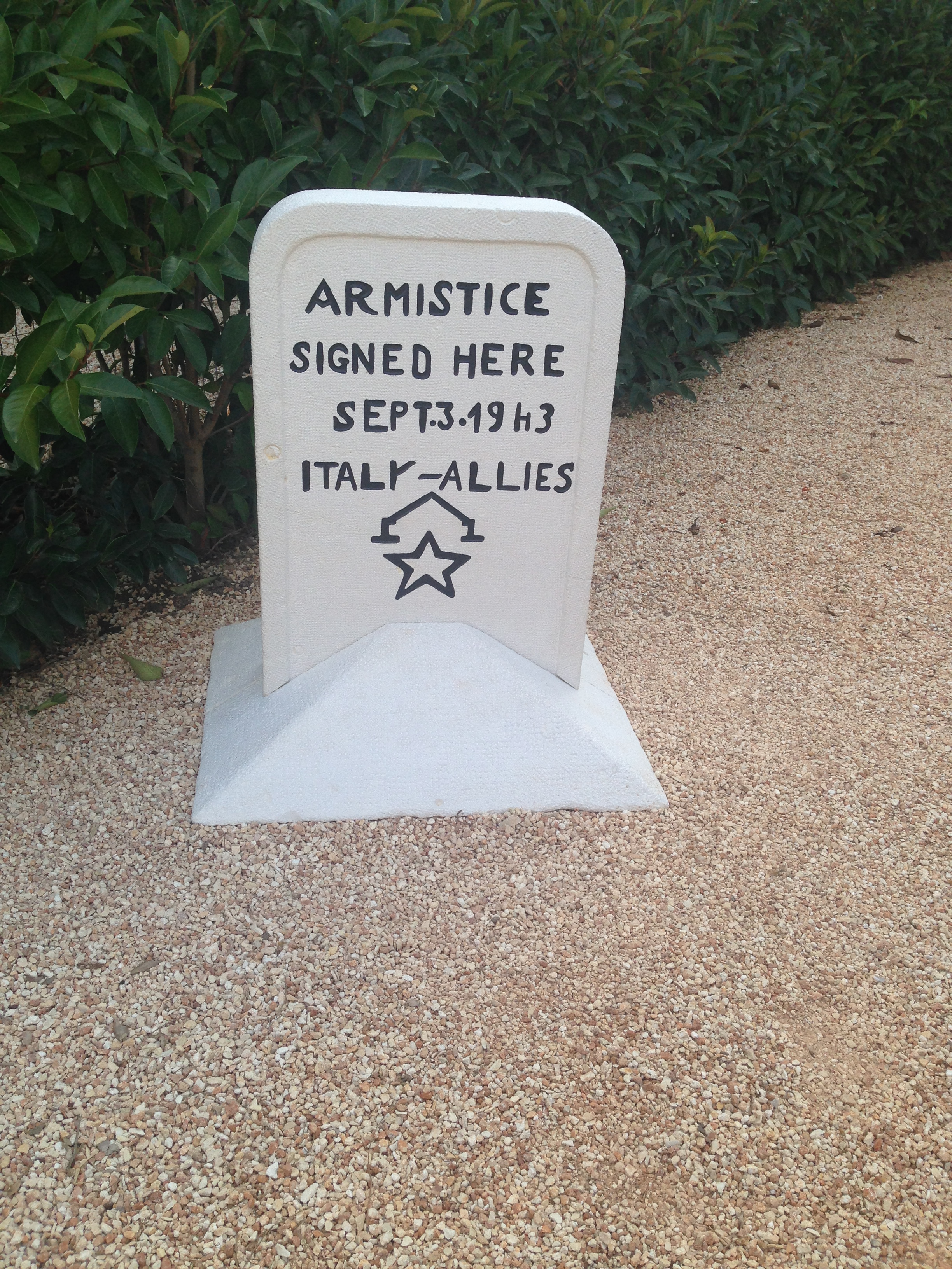 Il nuovo cippo dell'armistizio all'interno dell'antica proprietà inaugurato il 3 settembre 2016